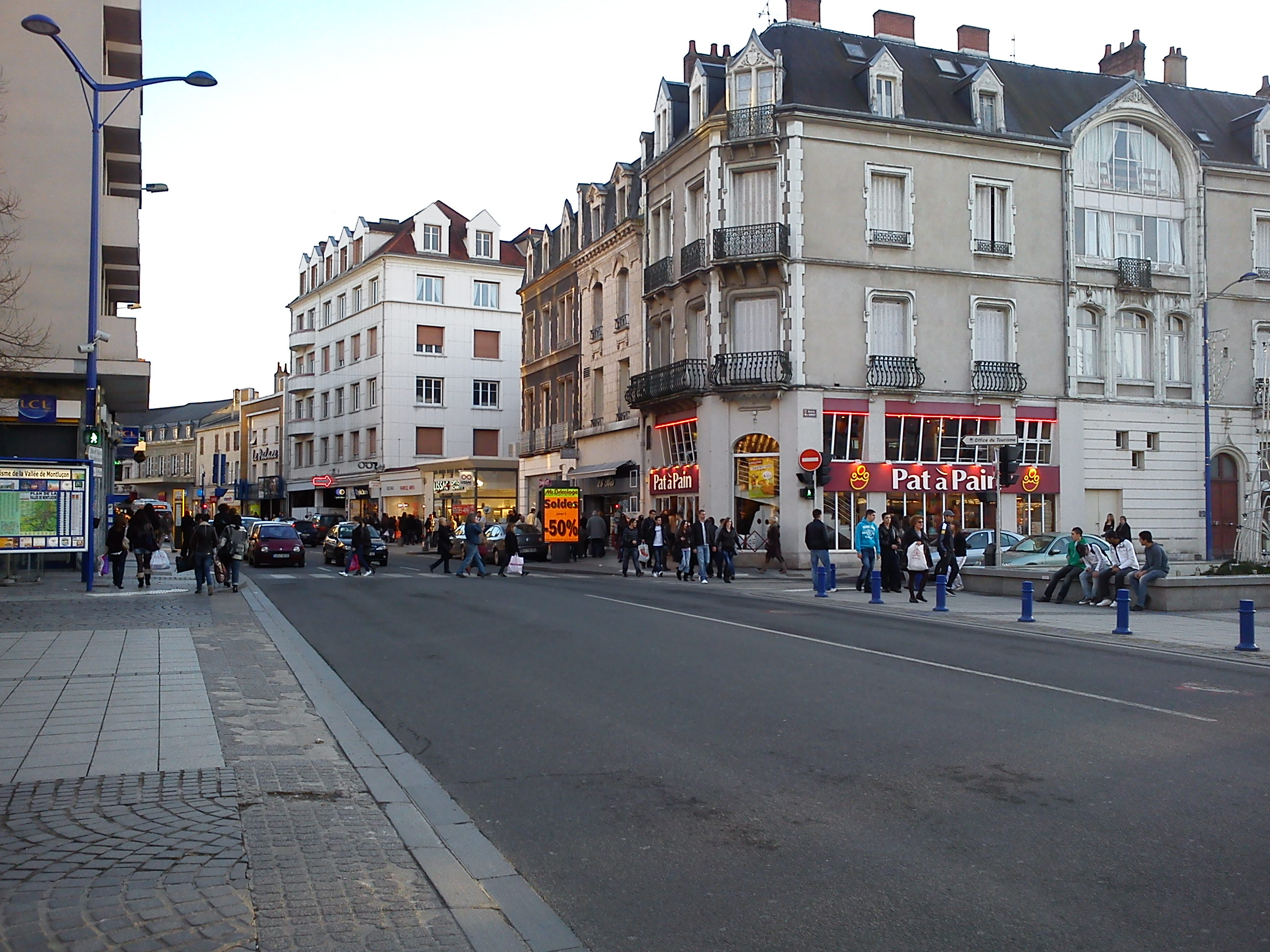 Vue du Boulevard de Courtais depuis la place Piquand